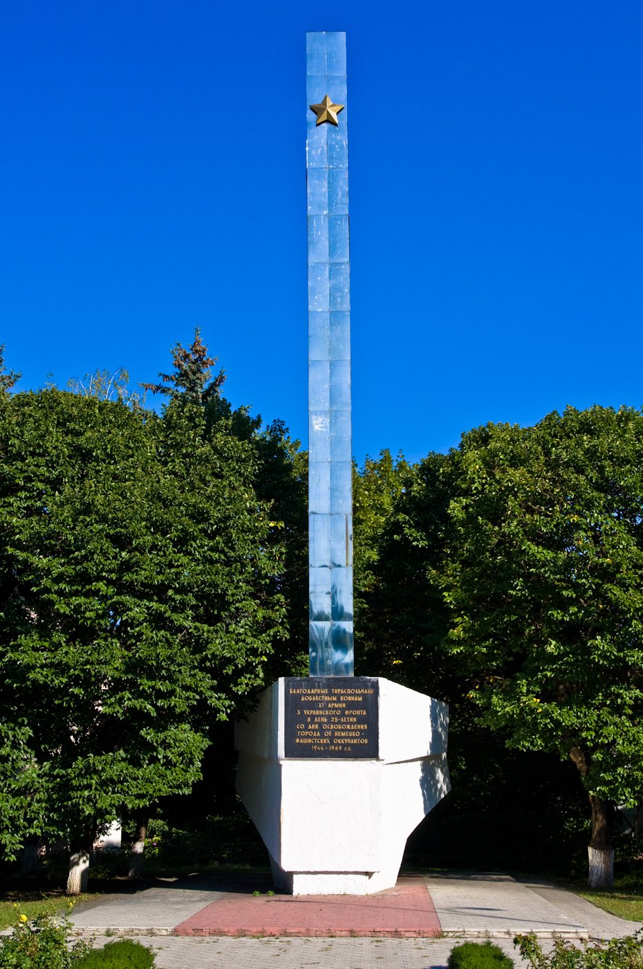 Памятник доблестным войнам 37 армии от благодарных тираспольчан.